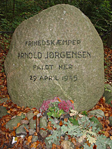 Mindestenen for Arnold Jørgensen placeret i Hørmøllen tæt ved jernbanen på sydsiden af Vejle fjord.